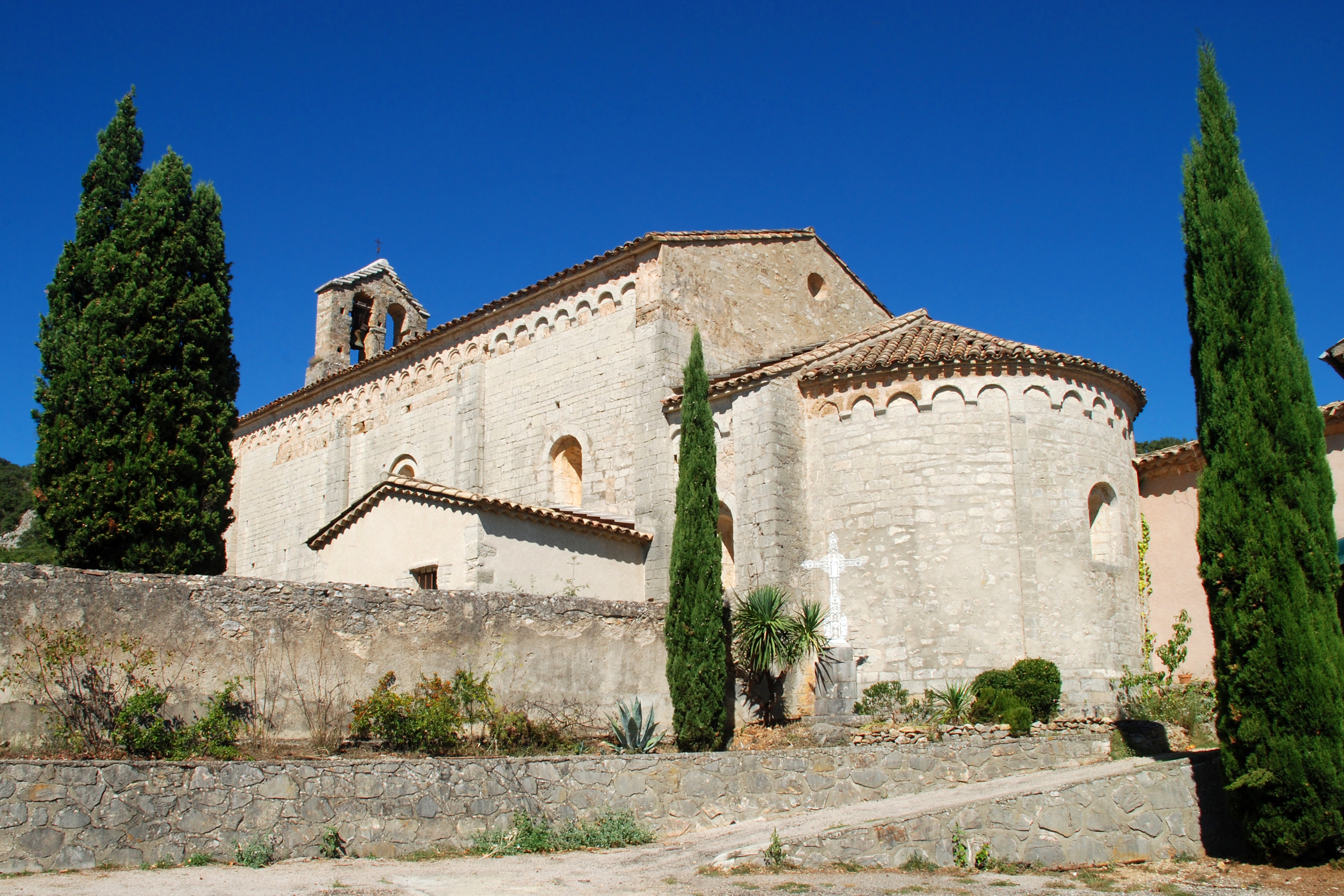 Església de Sant Andrieu de Buòja (Llenguadoc-Rosselló)